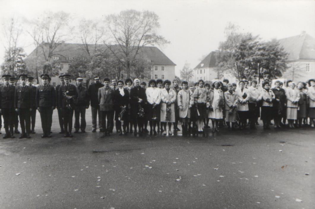 Uroczysta zbiórka w 45 Batalionie Medycznym